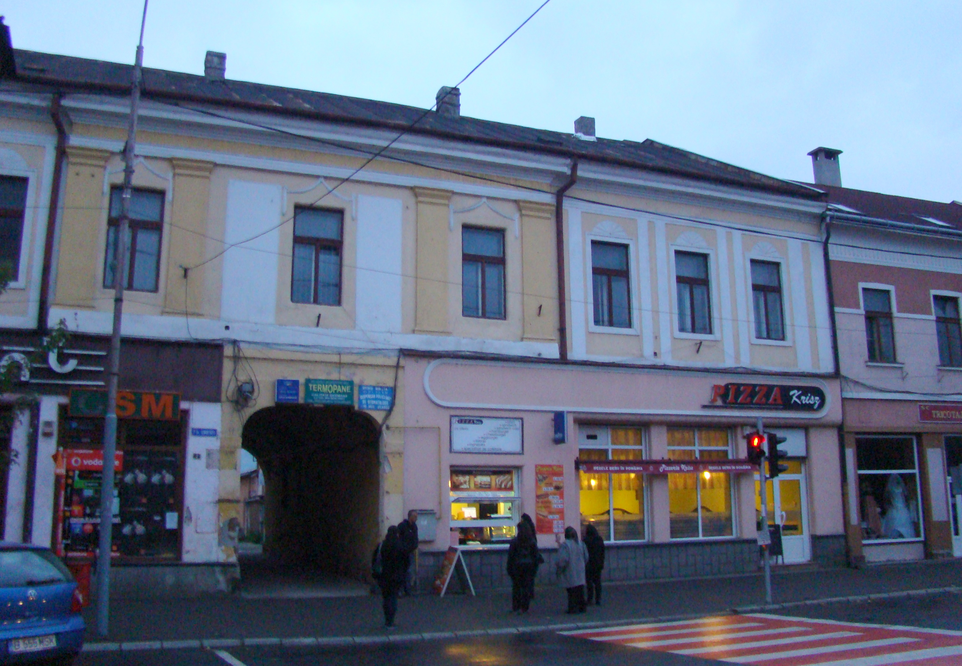 Casă, municipiul Sighetu Marmației, Piața Libertății 3